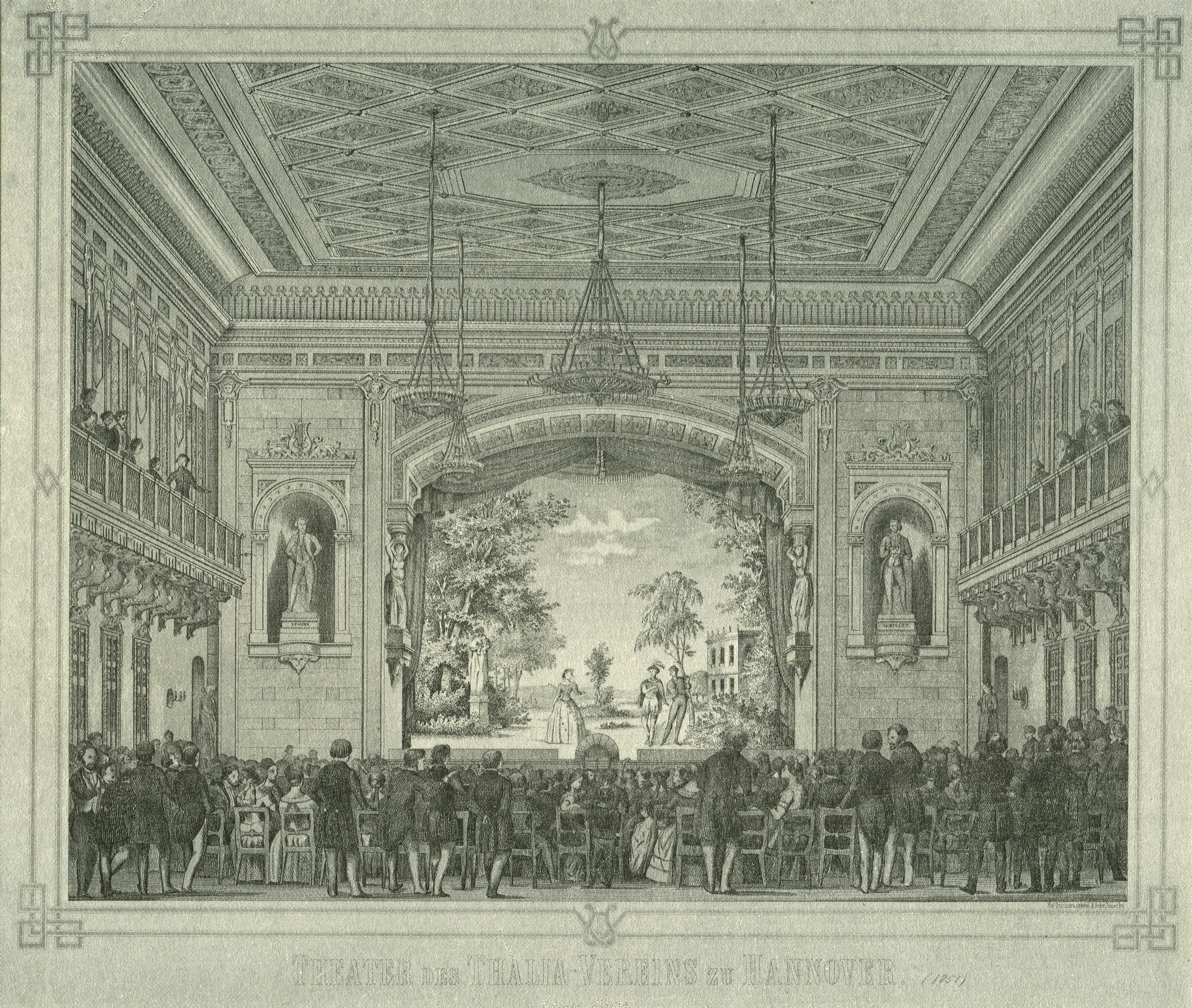 Punktgerastertes, angebliches „Faksimile“ aus der Loseblatt-Sammlung vom Hannover Archiv ("Kunst und Kultur in Hannover), Blatt K11, im Original unter dem Zierrahmen untertitelt „Theater des Thalia-Vereins zu Hannover“ während der Künstler beziehungsweise die Druck-Anstalt so zumindest auch in der Vergößerung mit 600 dpi nicht zu entziffern ist ...